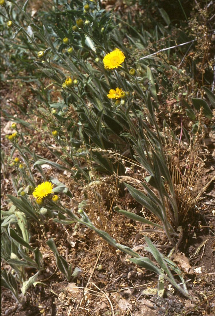 Christusaugen-Alant (Inula oculus-christi L.), Korbblütler (Asteraceae) - Österreich/Austria/Autriche: Burgenland, Hackelsberg bei Jois